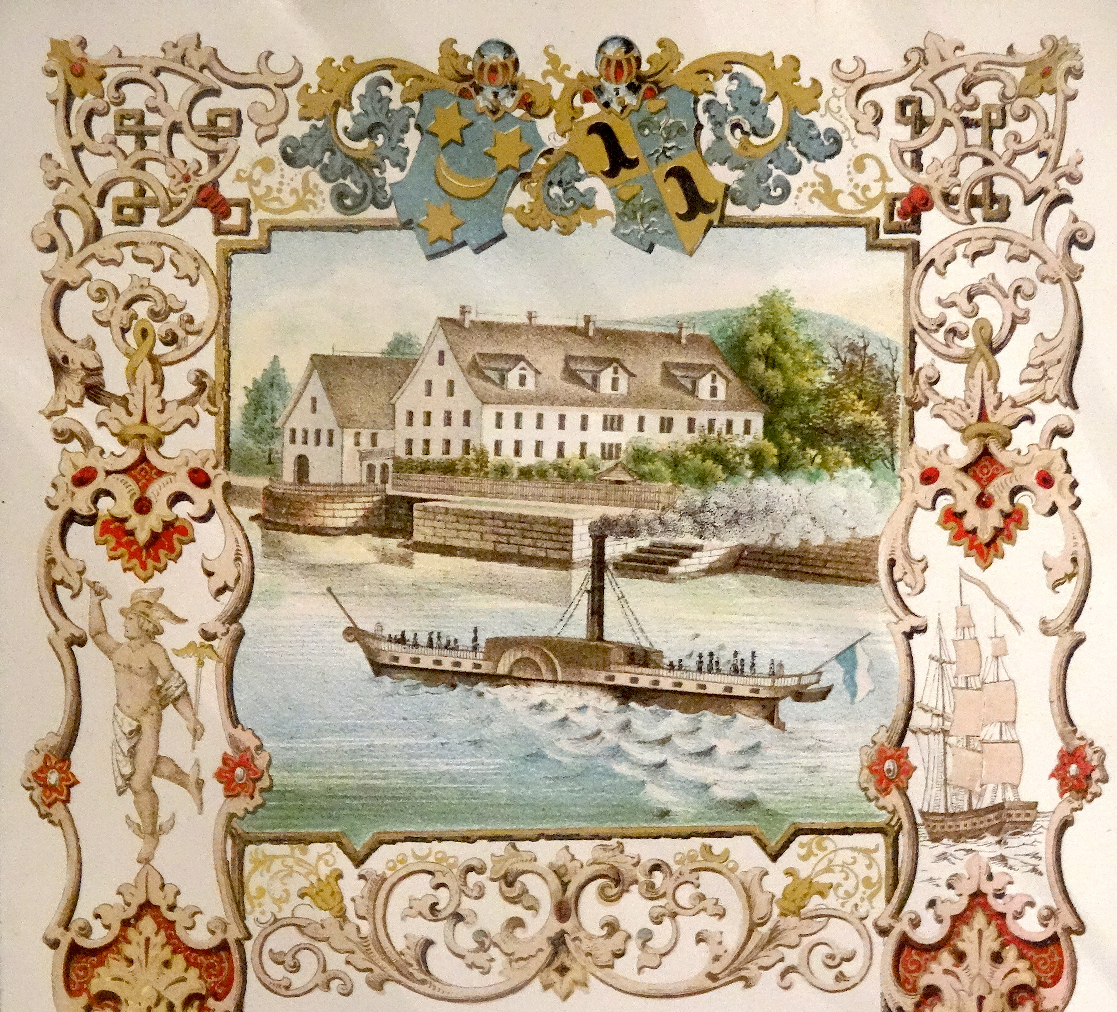 Gugger (Zollikon) Briefkopf der Firma Weber & Bleuler, 1855